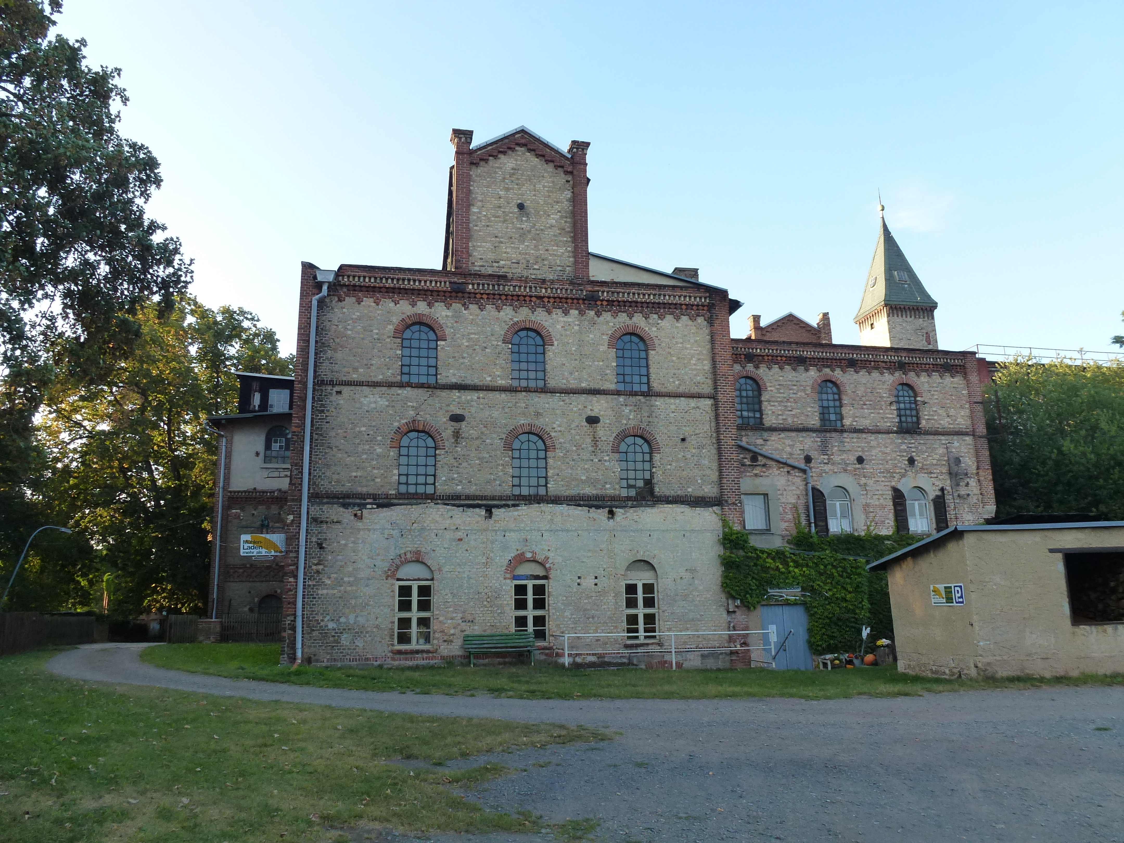 Bischof-Mühle in Meisdorf, die letzte von ehemals 16 Wassermühlen an der Selke.